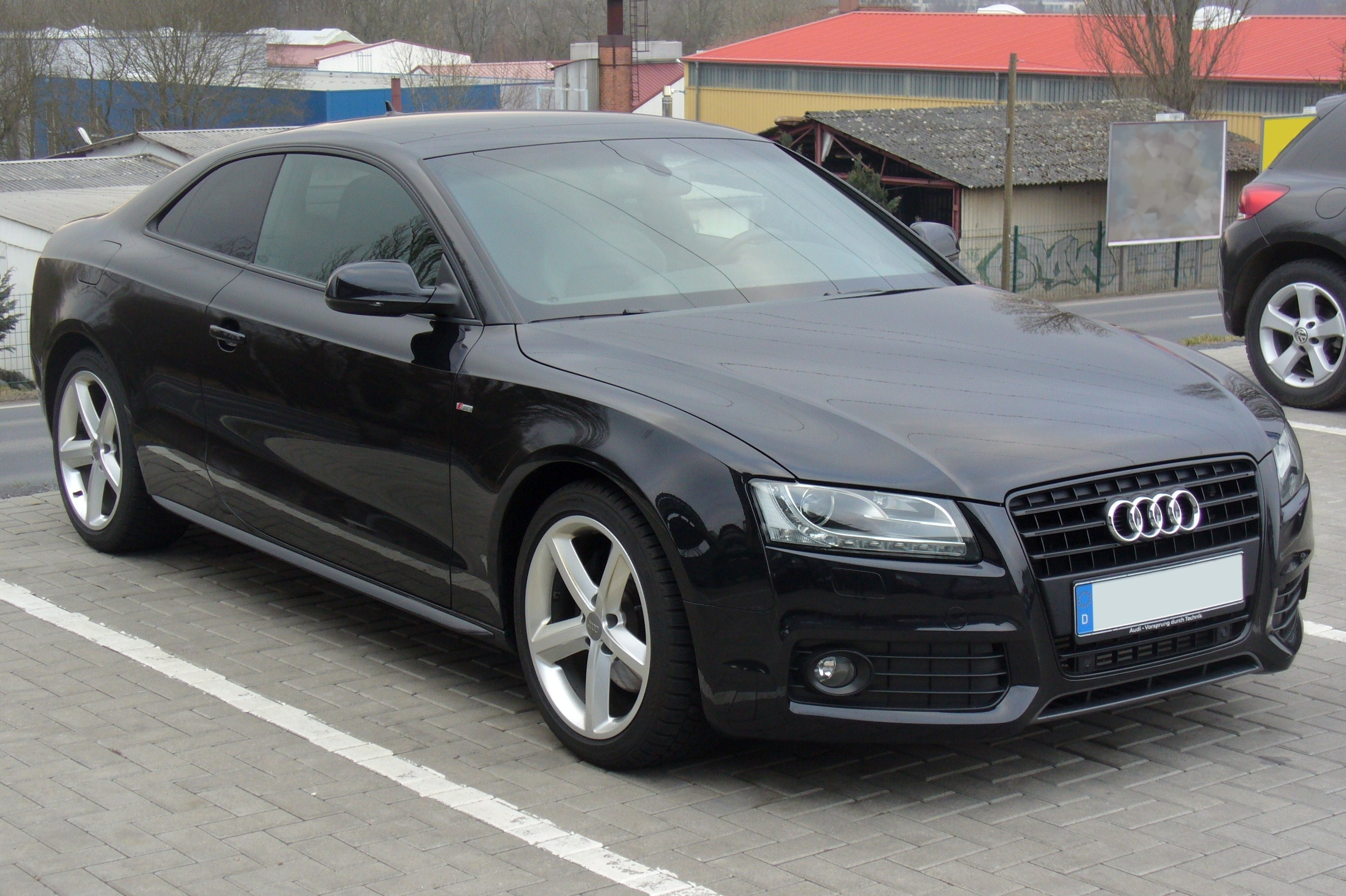 Audi A5 Coupé S-Line